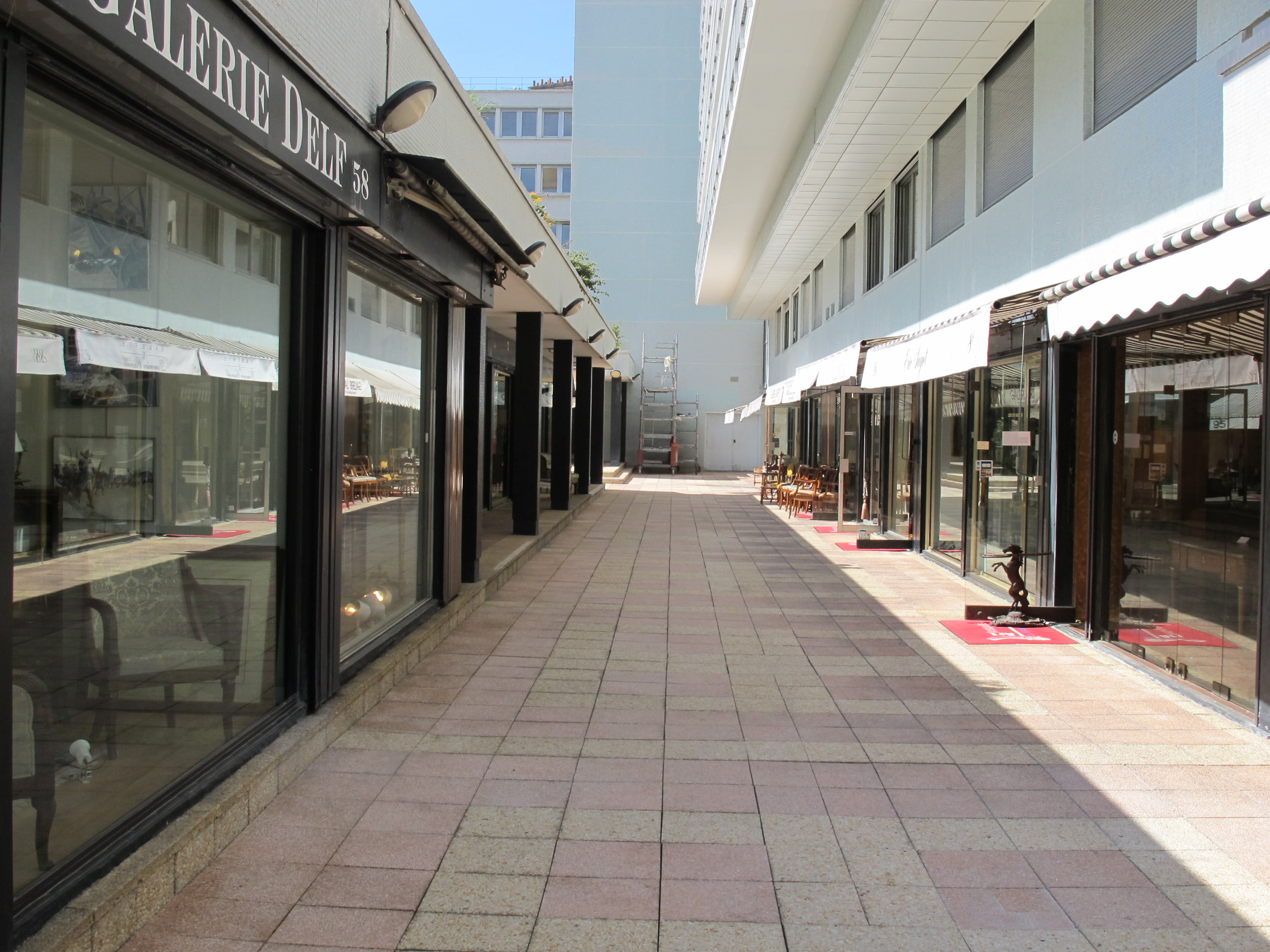 Village Suisse (Paris) - Place de Berne